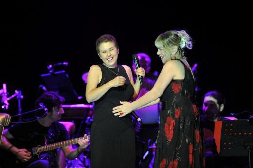 Cemiz Topuzlu Konser Salonu'ndan Nilüfer ve Sezen Aksu konserinden bir görünüm, 2012.